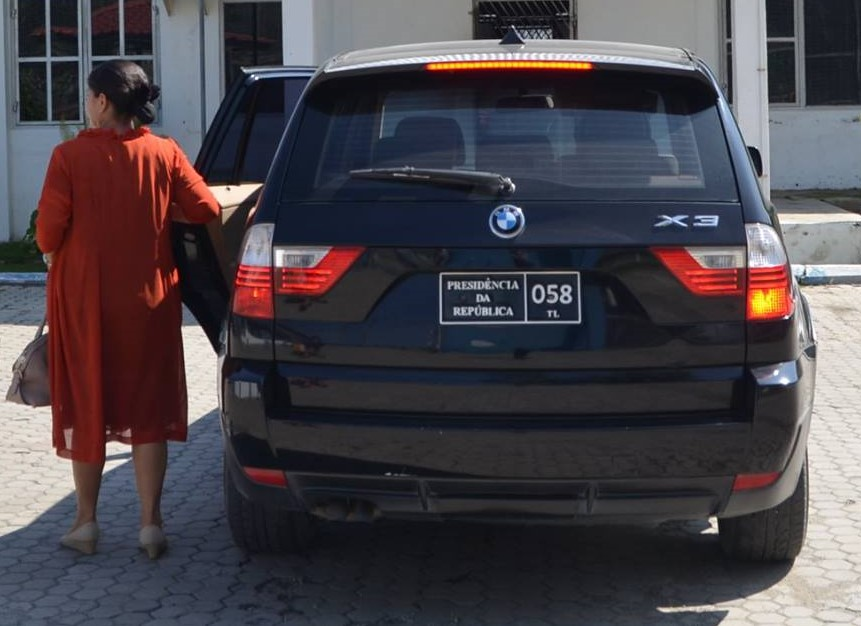 Präsidentengattin Isabel da Costa Ferreira mit ihrem Dienstwagen.